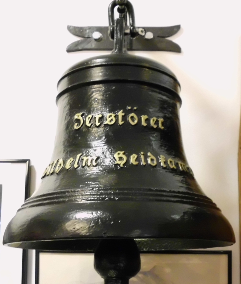 Schiffsglocke des Zerstörers Z 21 Wilhelm Heidkamp.